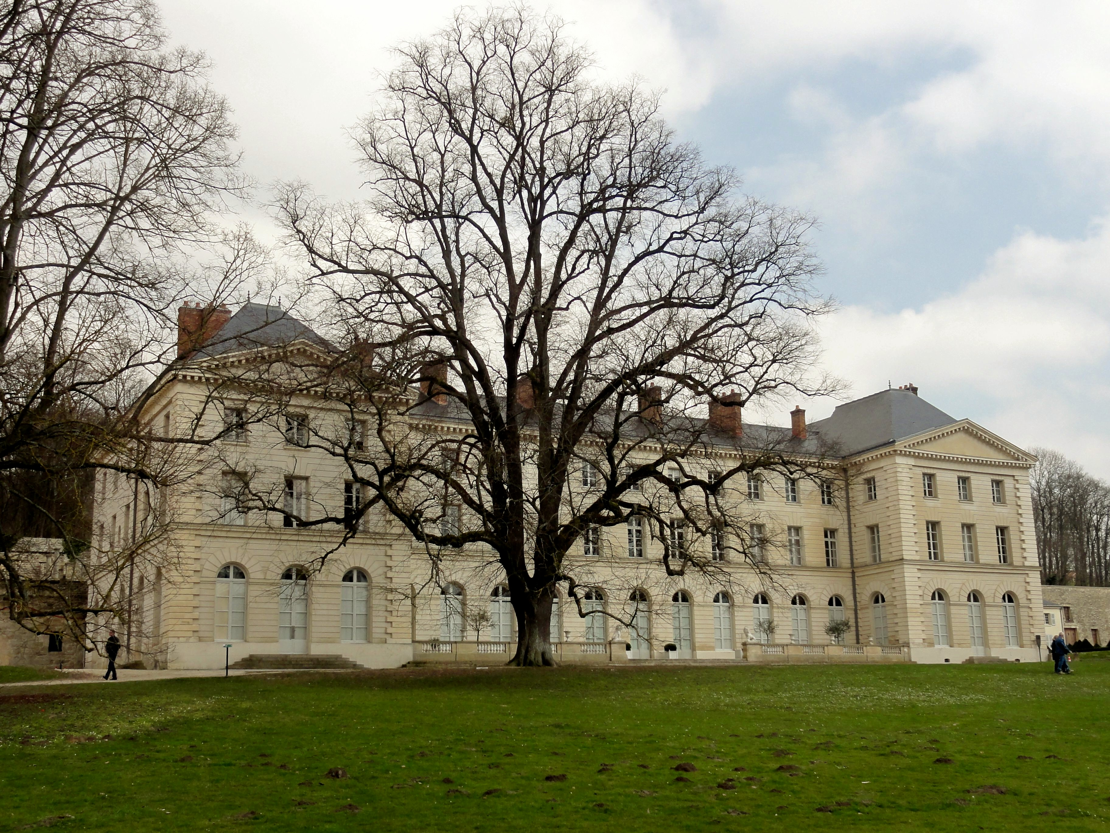 Façade méridionale.